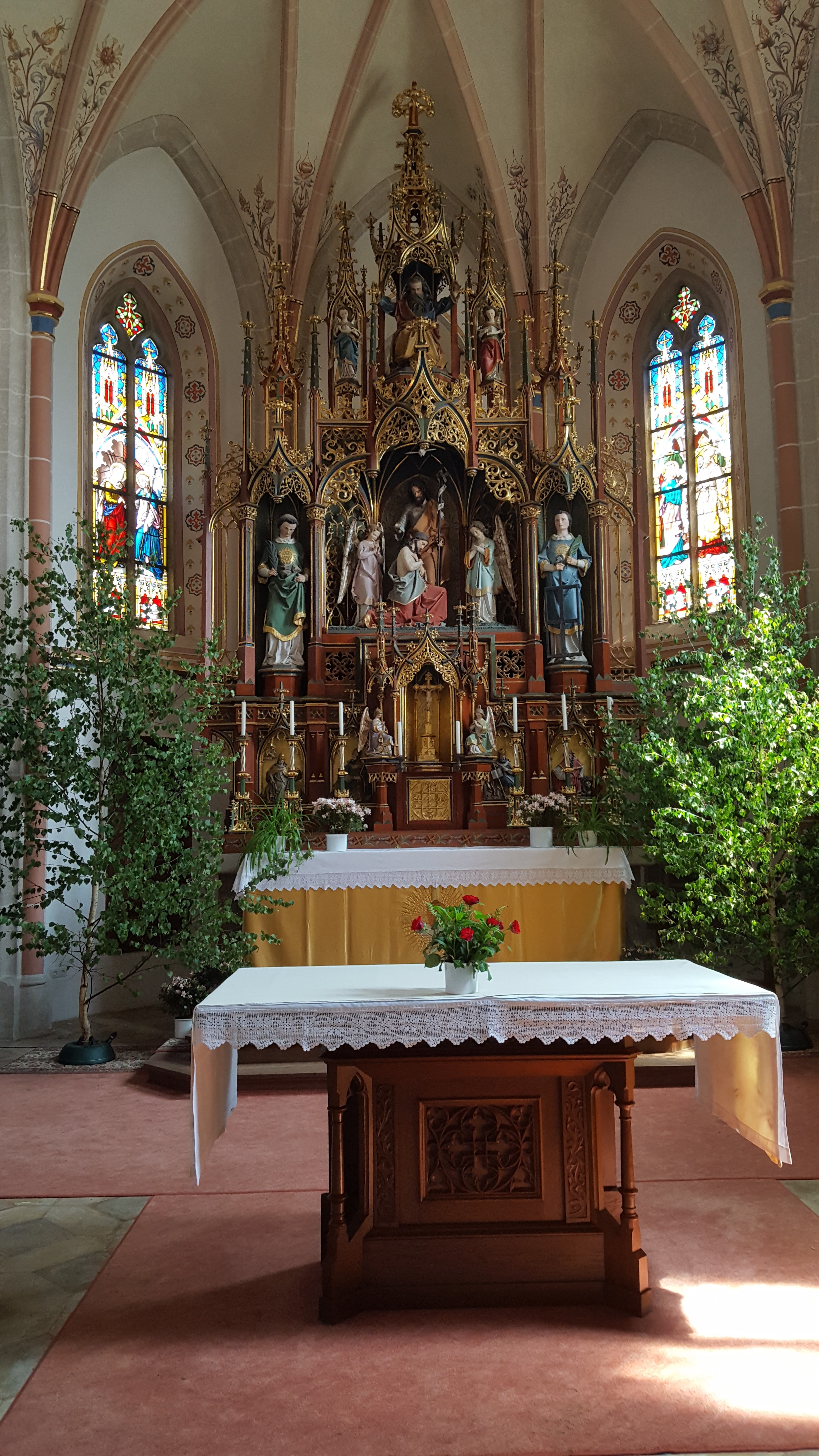 Hochaltar der Pfarrkirche St. Johannes Baptist und St. Johannes Evangelist in Seyboldsdorf